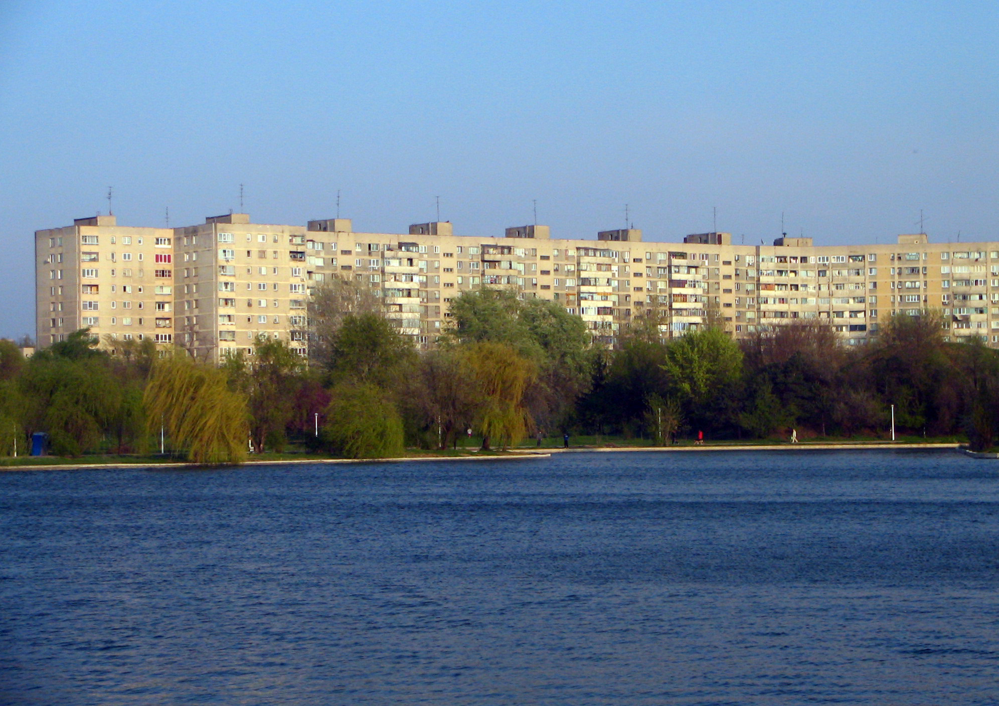 Nişte blocuri din cartierul Titan, Bucureşti, văzute din parcul Titan / IOR.